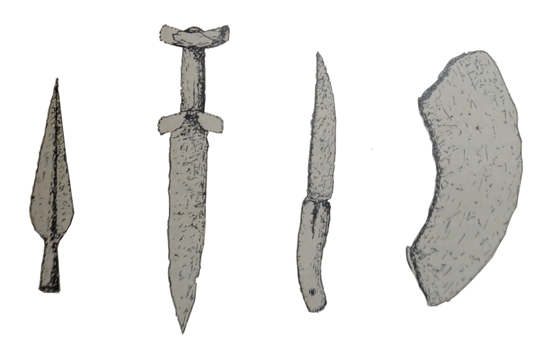 extrait de : Dupuis, J.,Découvertes archéologiques régionales : Fouilles exécutées dans le cimetière celtique d'Hauviné in Bulletin de la Société Archéologique Champenoise, ISSN 1145-7295 sous la cote de la bibliothèque de Reims : PER CH IV 13 ; n°2, juin 1913 , p. 39-44 .